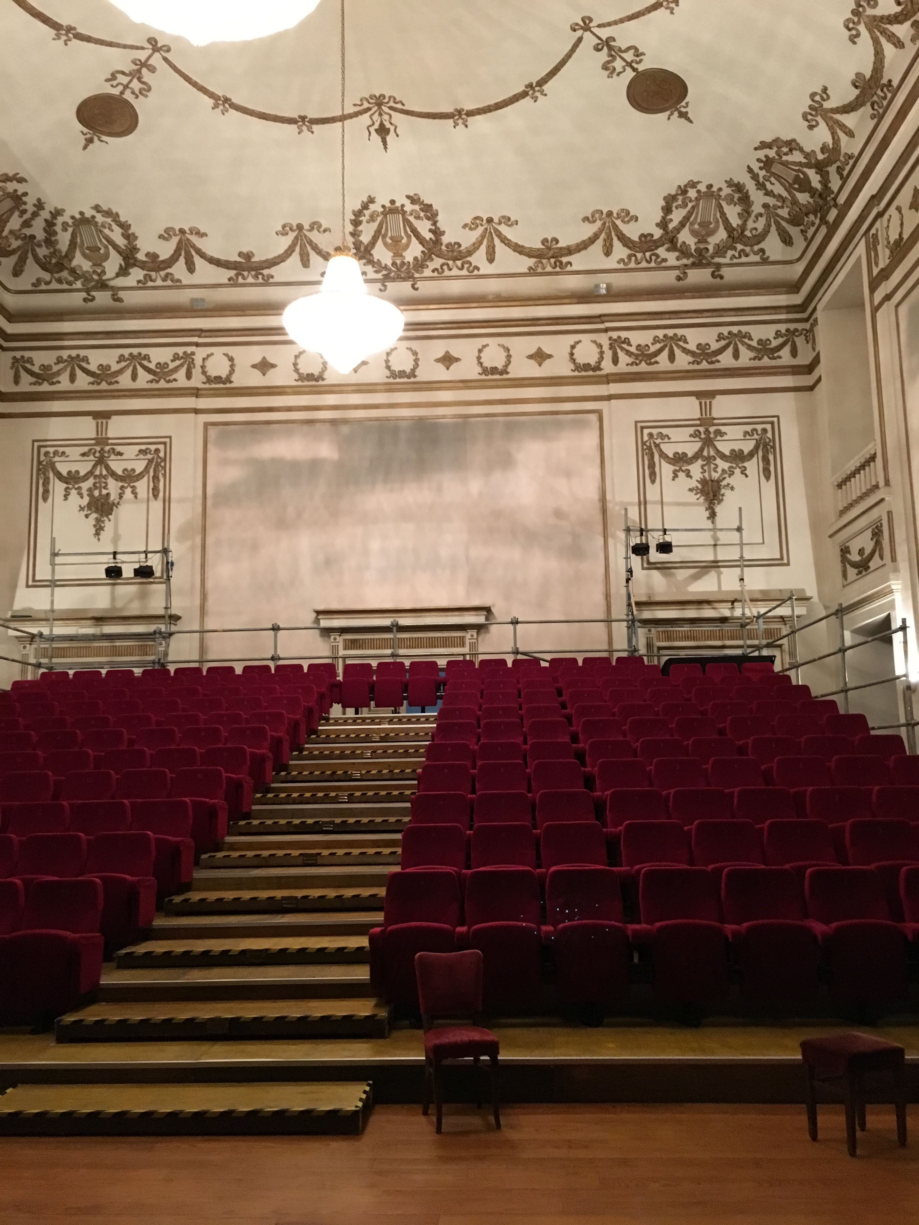 Teatro della Pergola. Ridotto